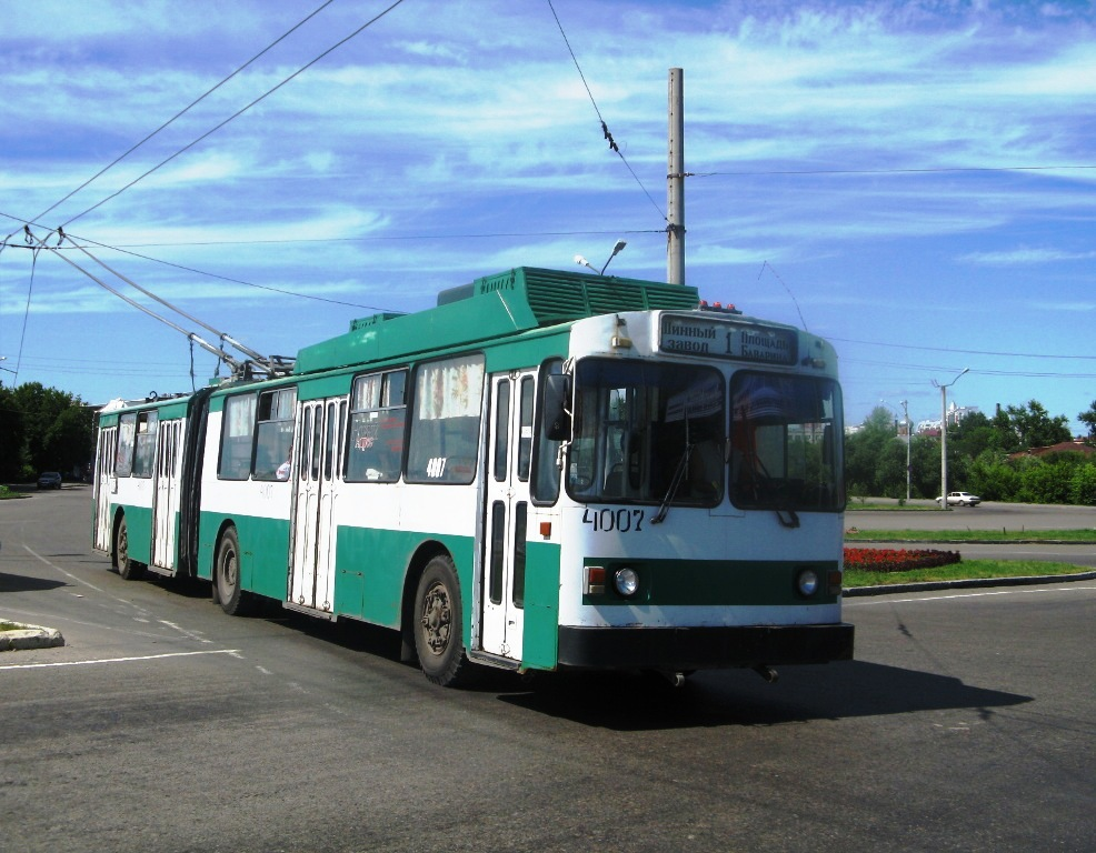 Троллейбус ЗиУ-10 №4007 в Барнауле